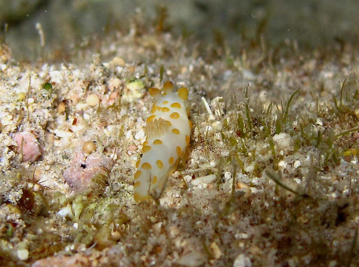 La limace de mer Gymnodoris impudica de nuit à la Réunion.